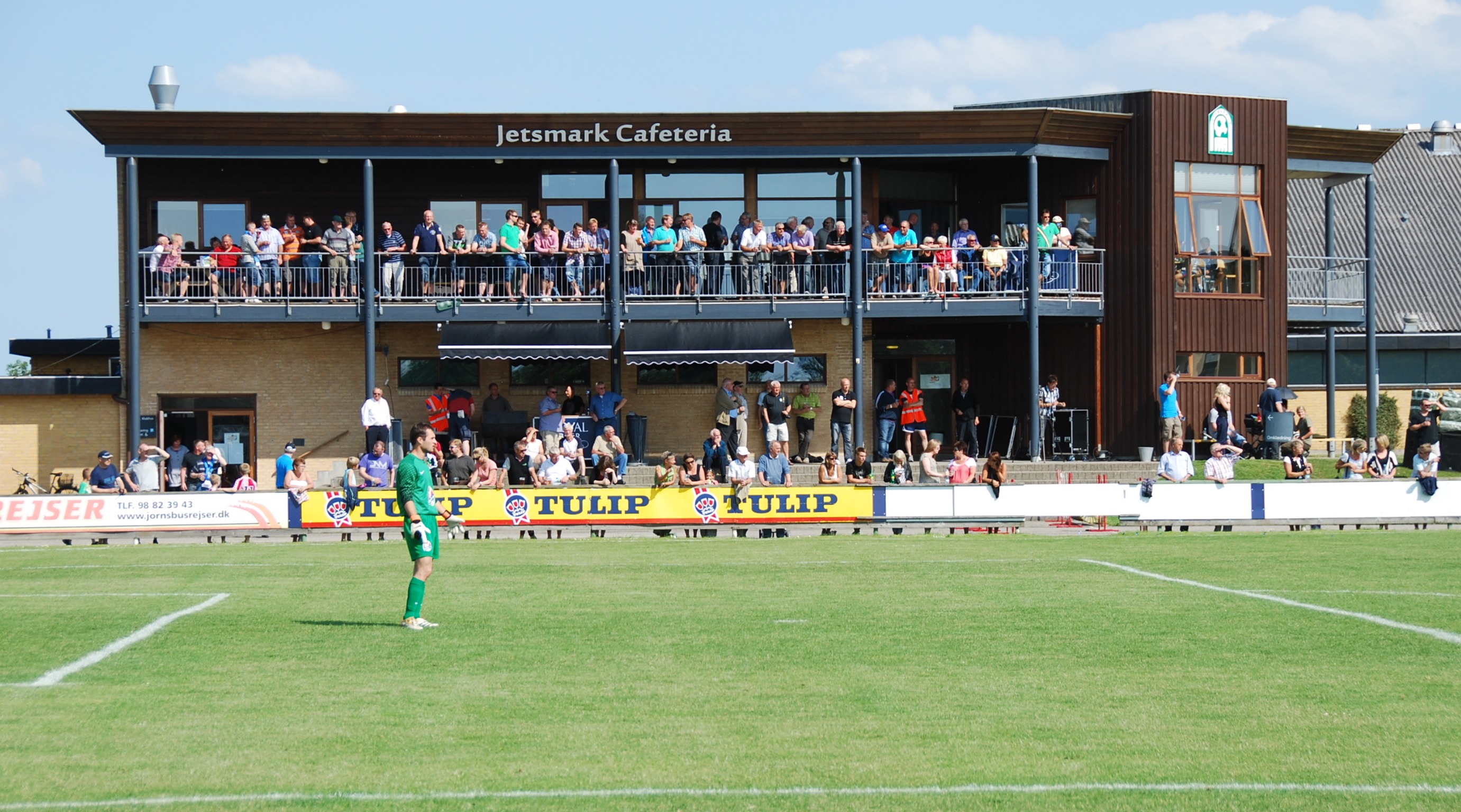 Omklædning og klubhuset på Jetsmark Stadion i Pandrup. Stadion er hjemmebane for Blokhus FC.